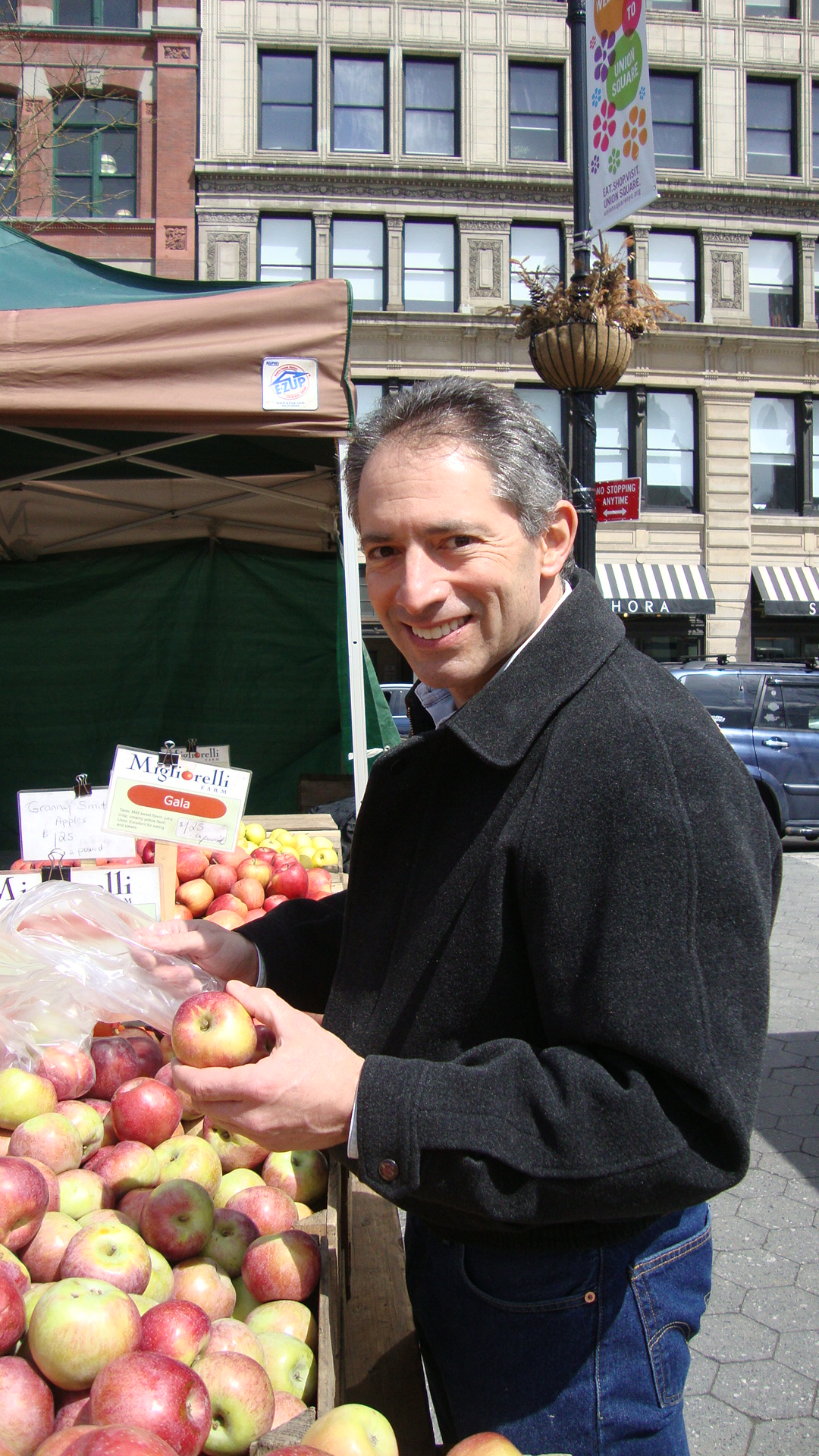 David Shalleck